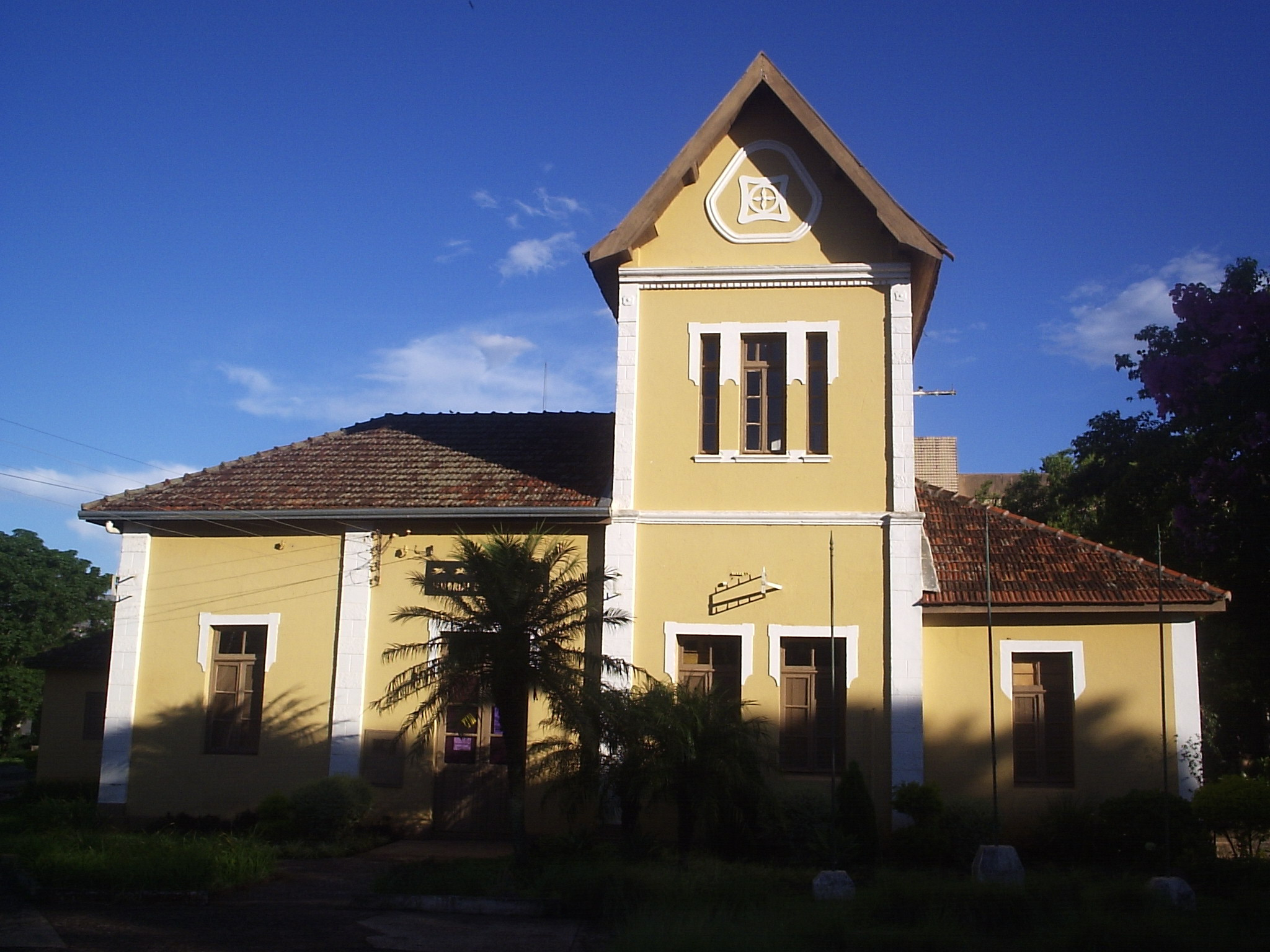 Antiga Estação Ferroviária de Santo Ângelo, no Rio Grande do Sul.